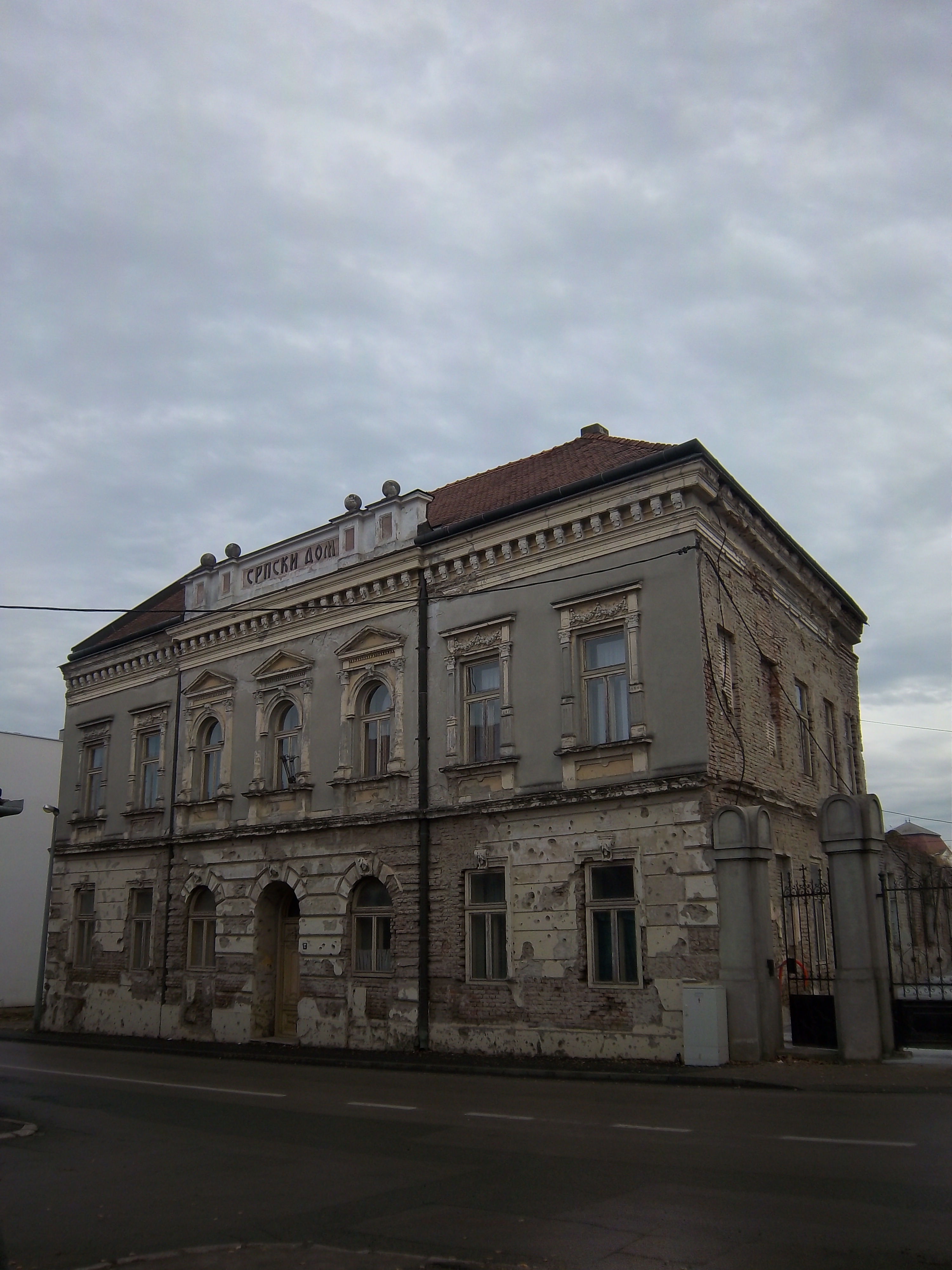 Srpski dom Vukovar